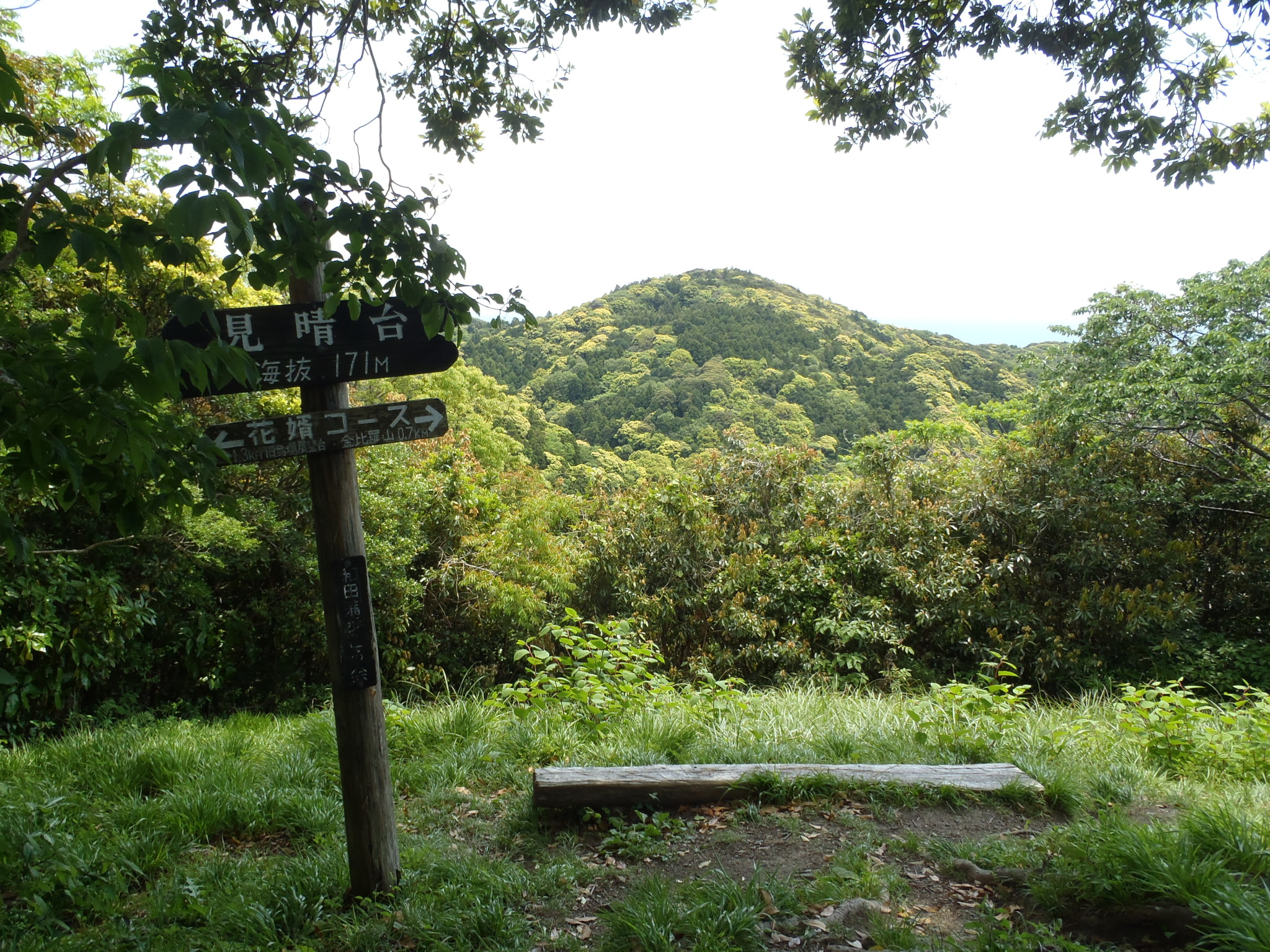 花婿コース見晴台 2013-05-08 / Bon-videjo en la Kurso de Novedzo